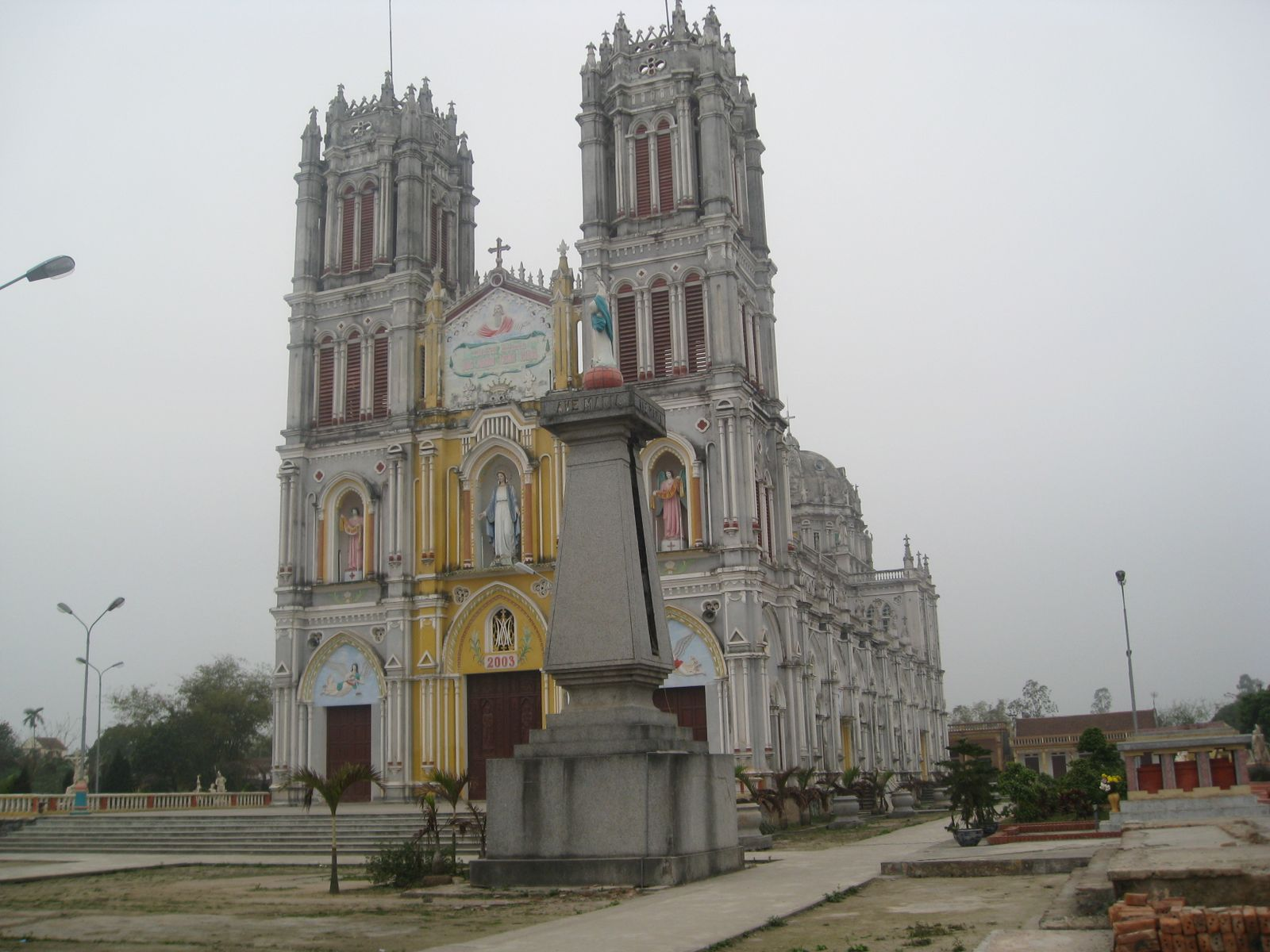 chụp bởi : nguyễn khắc Bàn. Thánh đường giáo xứ An Lập